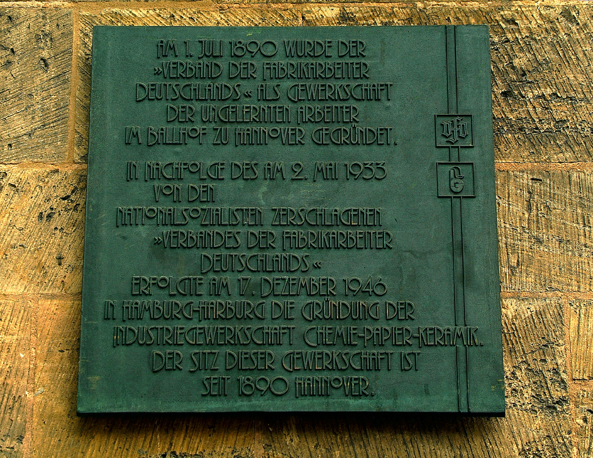 Sie haben ein besseres Bild? Sogar ein historisches Dokument als Bild(ungsförderung)? Zeigen Sie' s uns. Stiften Sie es Ihren Kindern, unseren Enkeln, allen Menschen. Hier.